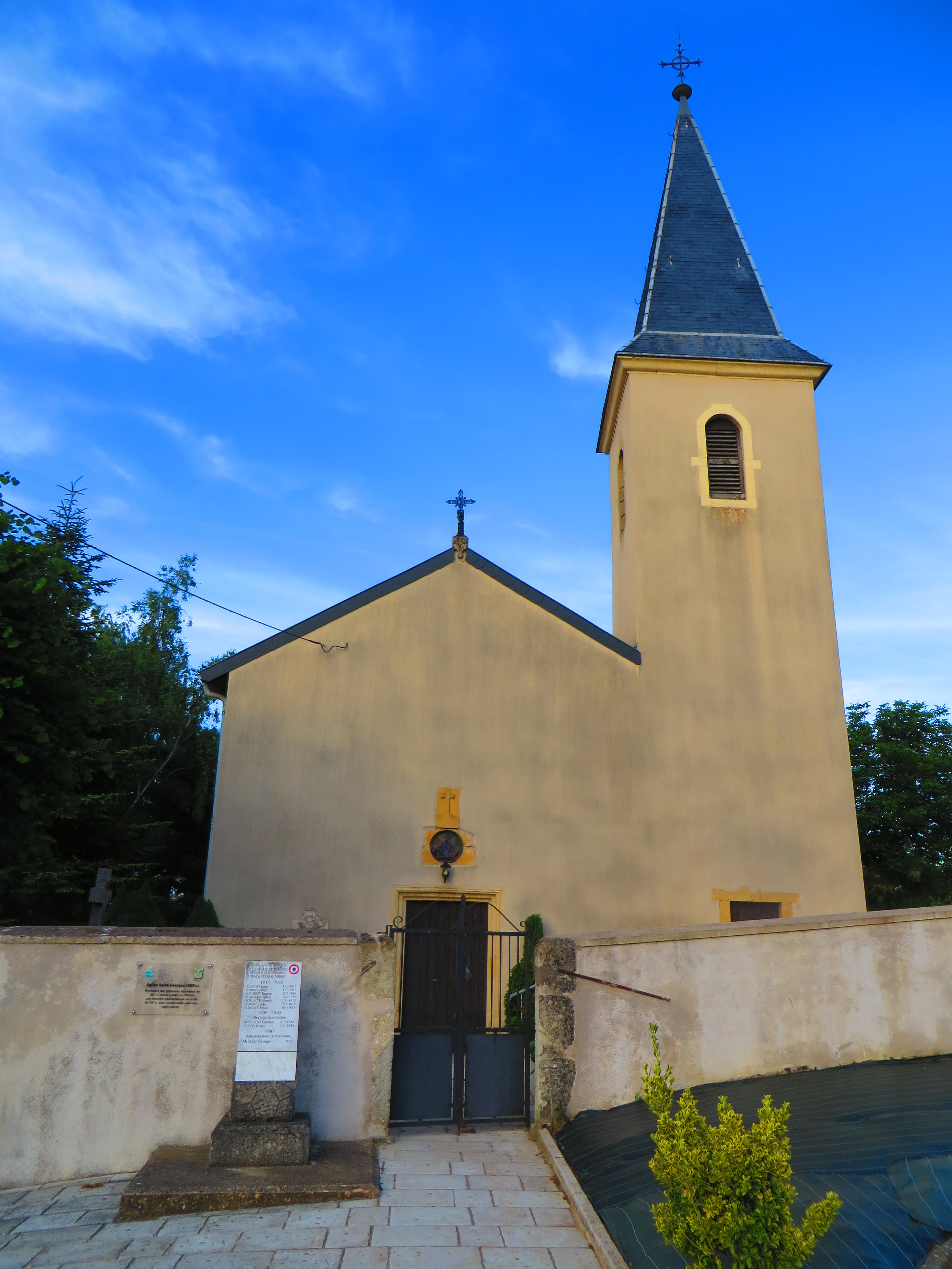 Saint Jure église Saint-Georges